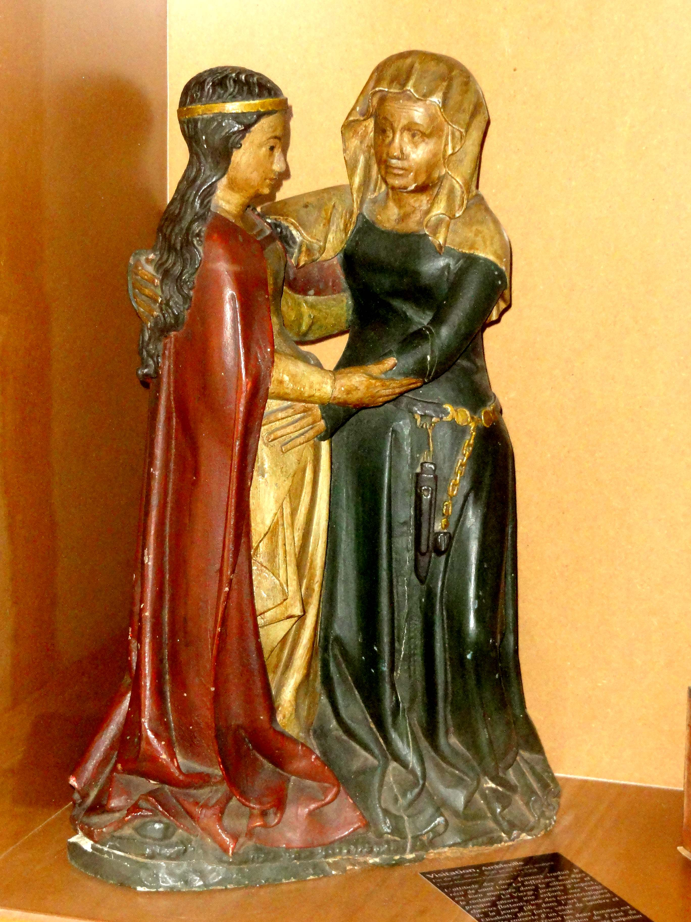 Groupe sculpté - La Visitation, entreposé au musée du Vexin français.